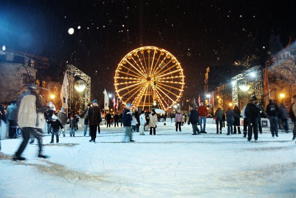 Patinoire du Marché de Noel